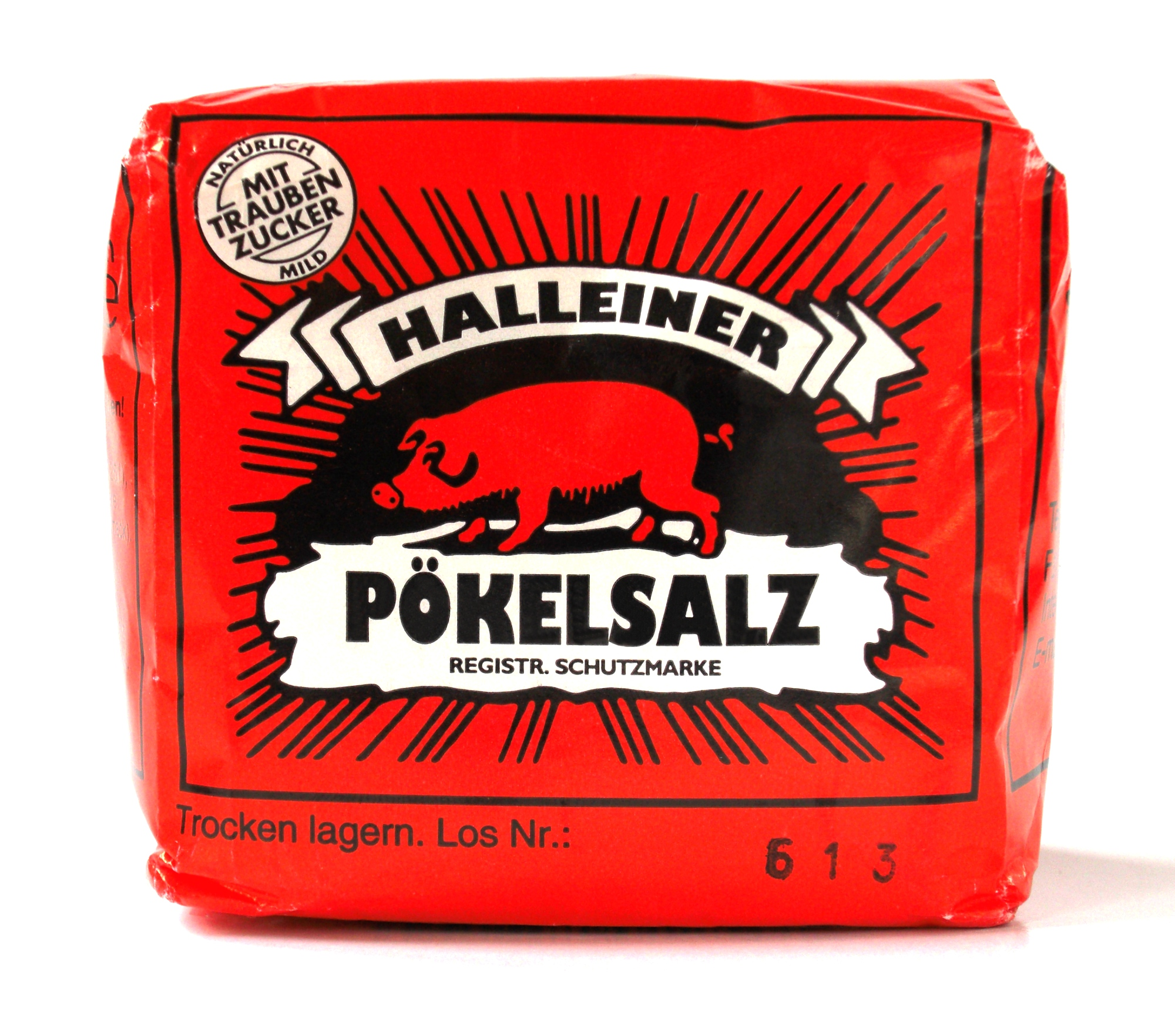 See title